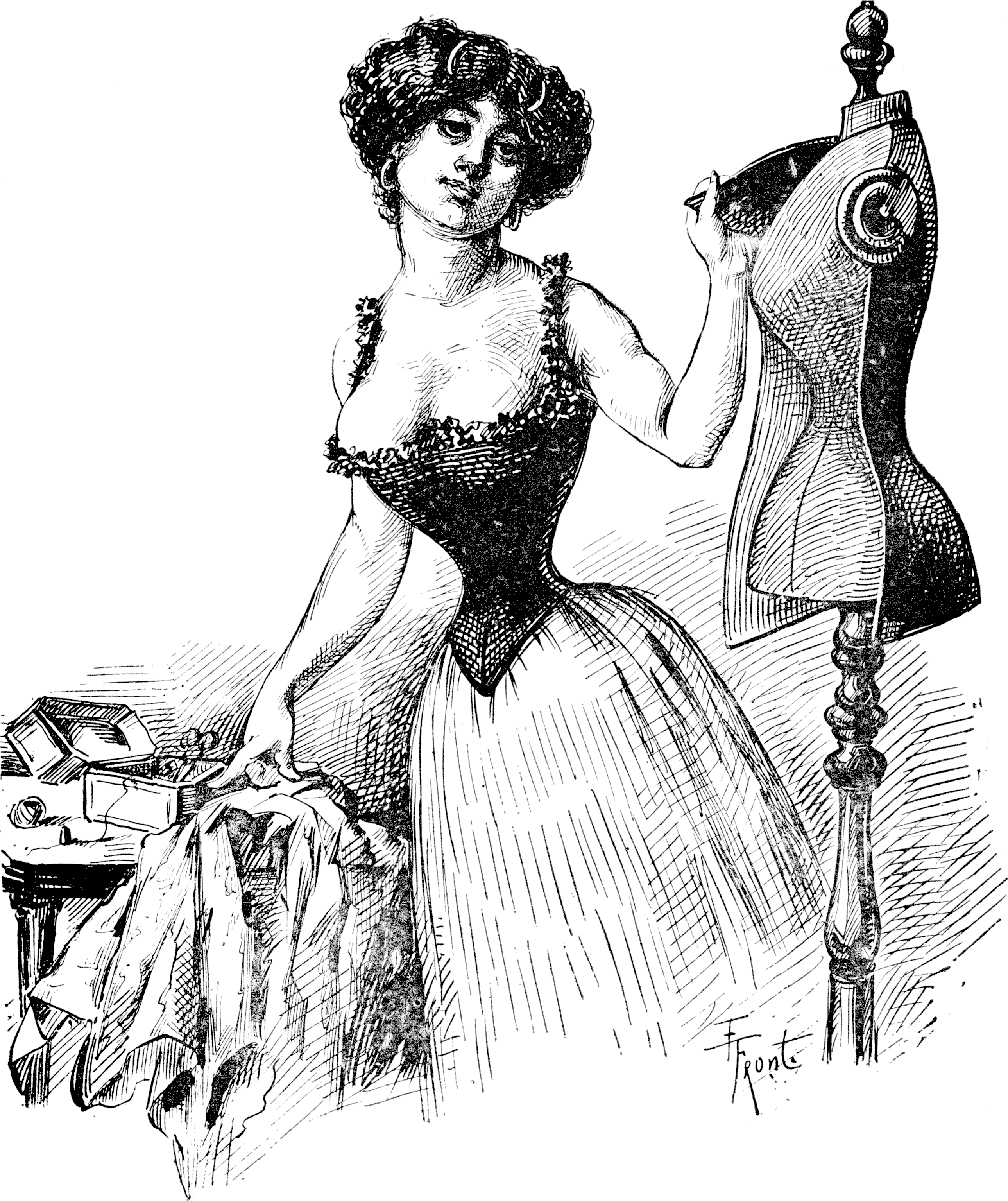 Illustration for Le Mannequin